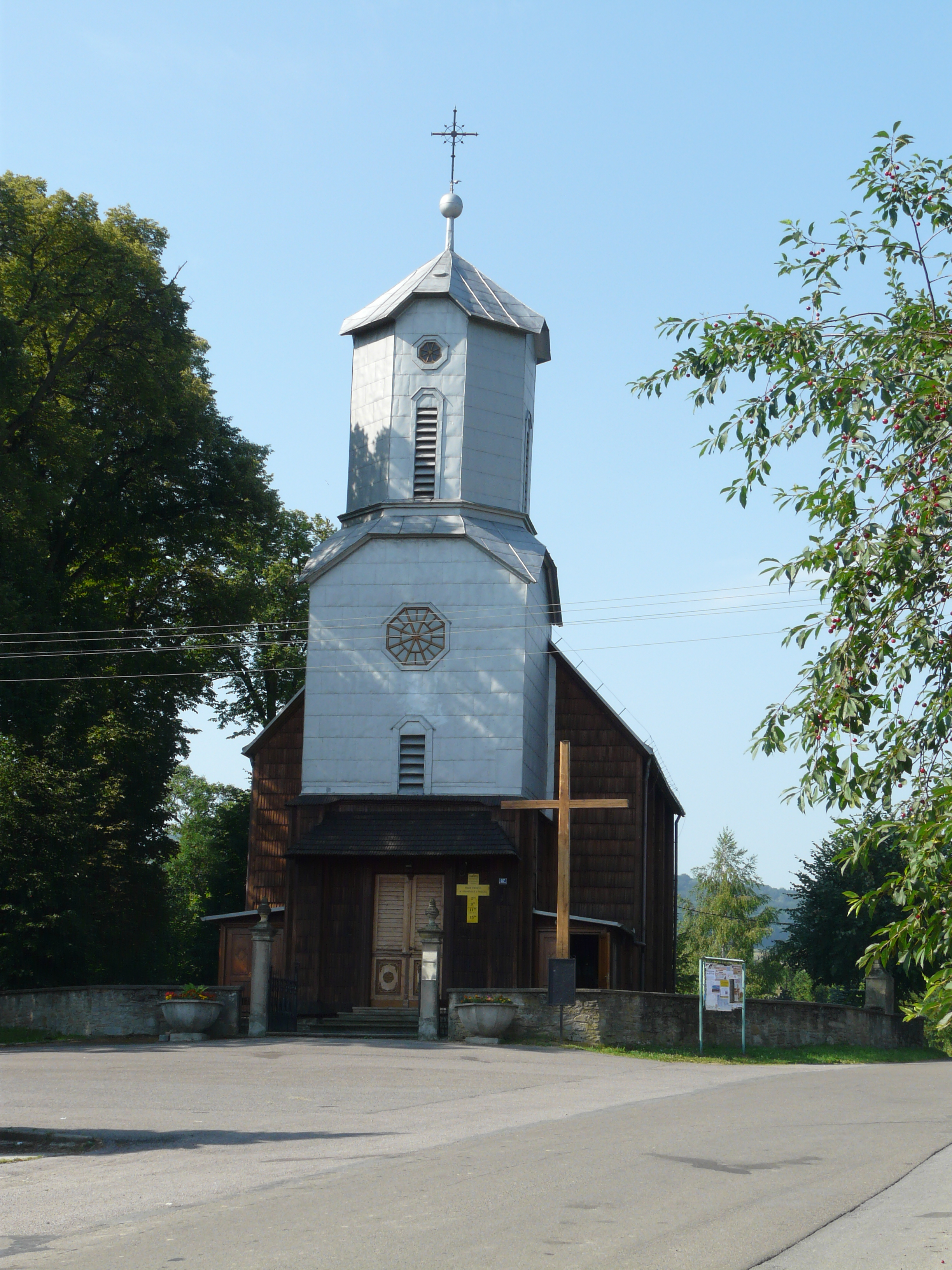 Klimkówka - kościół parafialny p.w. św. Michała Archanioła